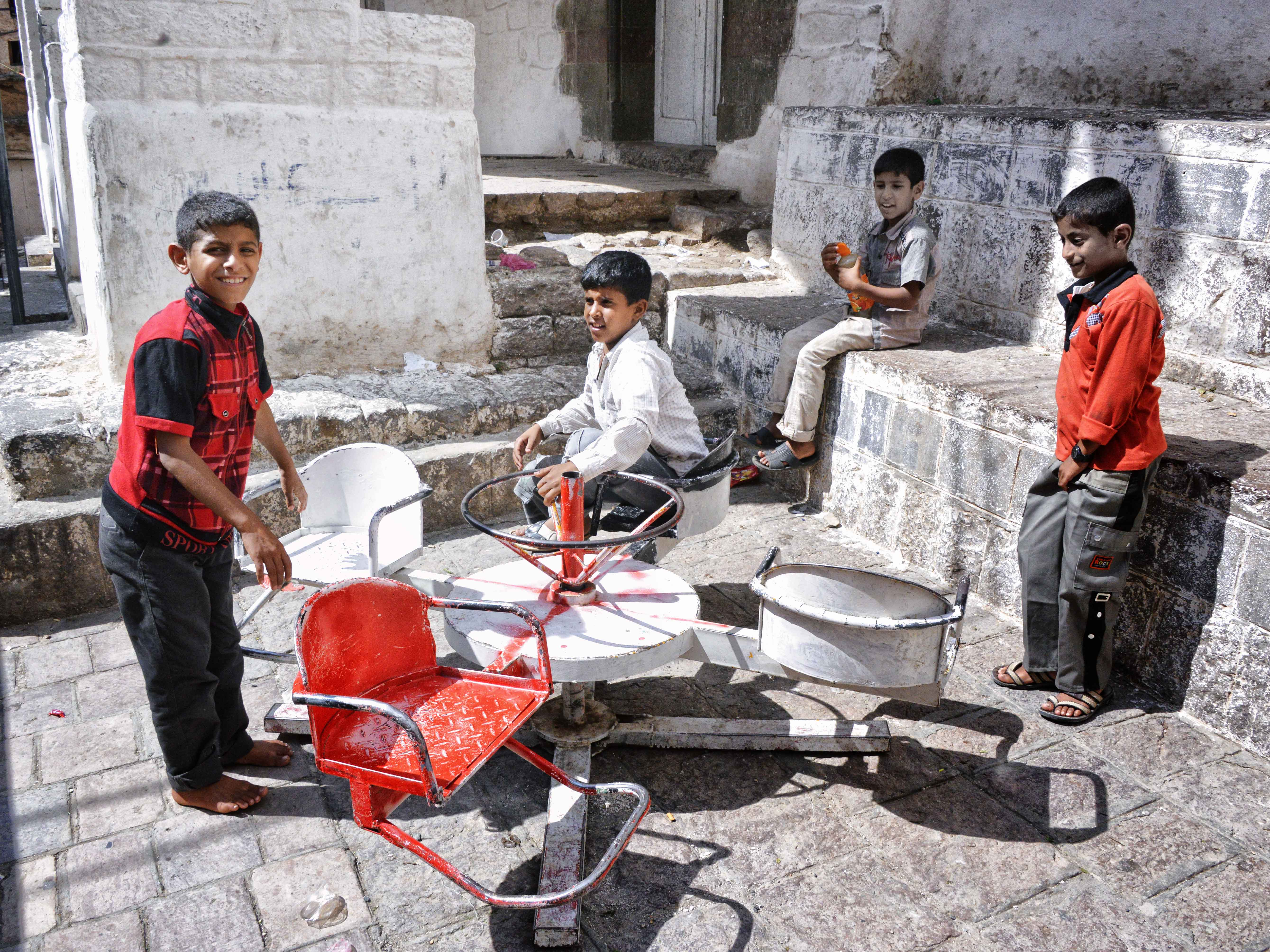 Street Fun, Yemen